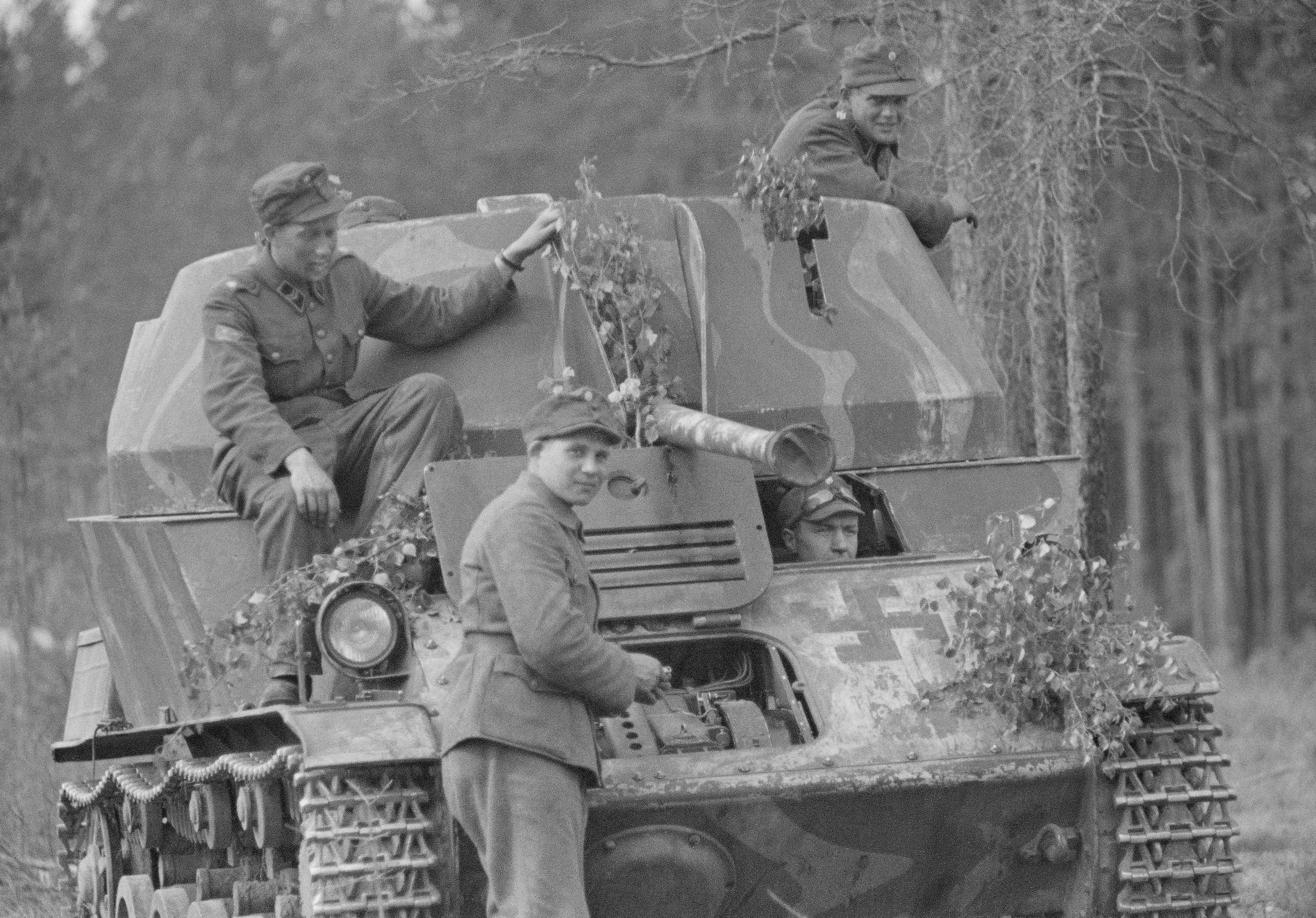 Финская зенитная самоходная установка Landsverk L-62 Anti II, район Лийколы, Карельский перешеек, 15 июня 1944 г.